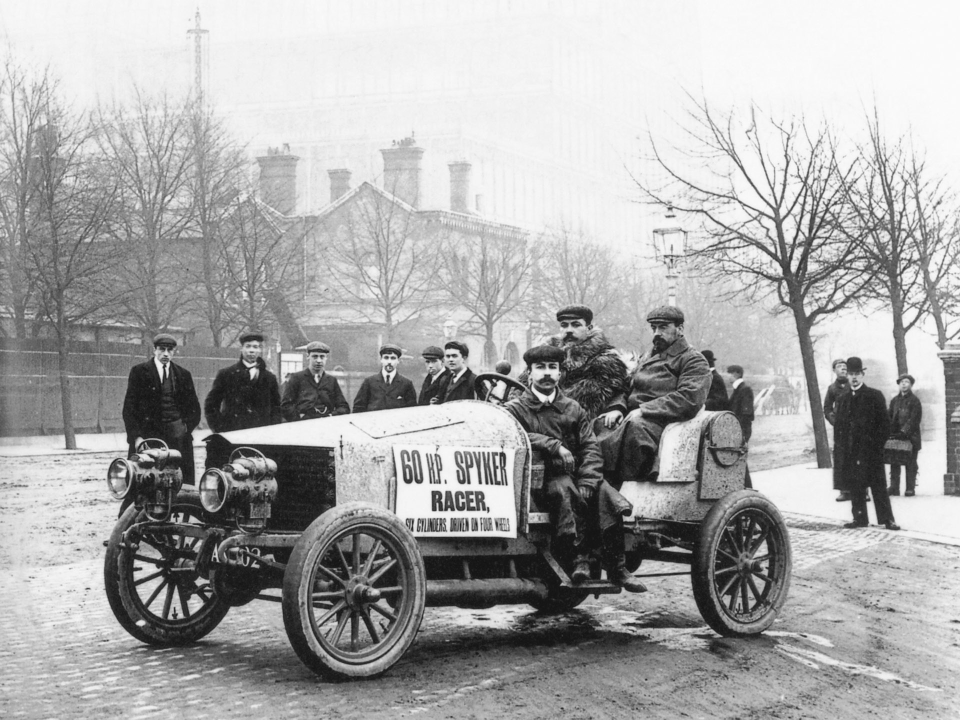 Das erste Automobil mit Allradantrieb: Der Spyker 60 HP von 1903. Quelle: [1] Verwendung laut: Wikipedia:Bildrechte, 2.4.1 Pragmatische Regelung bei Bildern, die älter als 100 Jahre sind.